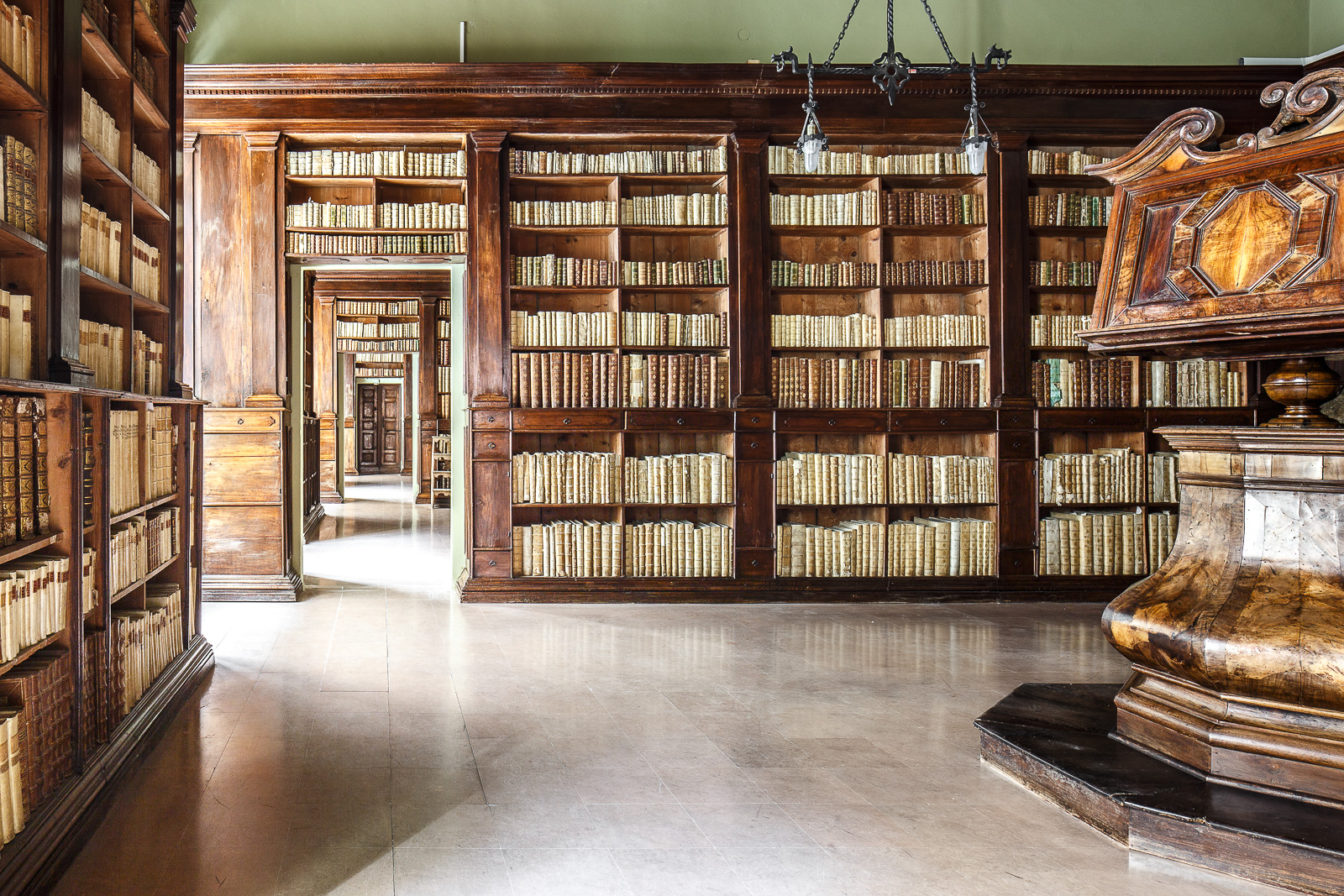 Palazzo Gambalunga (Biblioteca Civica) - Sale seicentesche This is a photo of a monument which is part of cultural heritage of Italy.